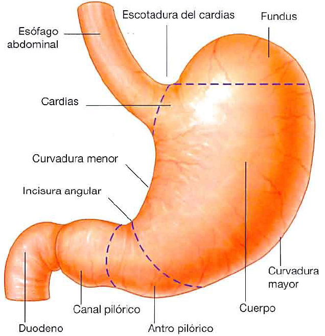 Esquema que muestra las partes del estomago